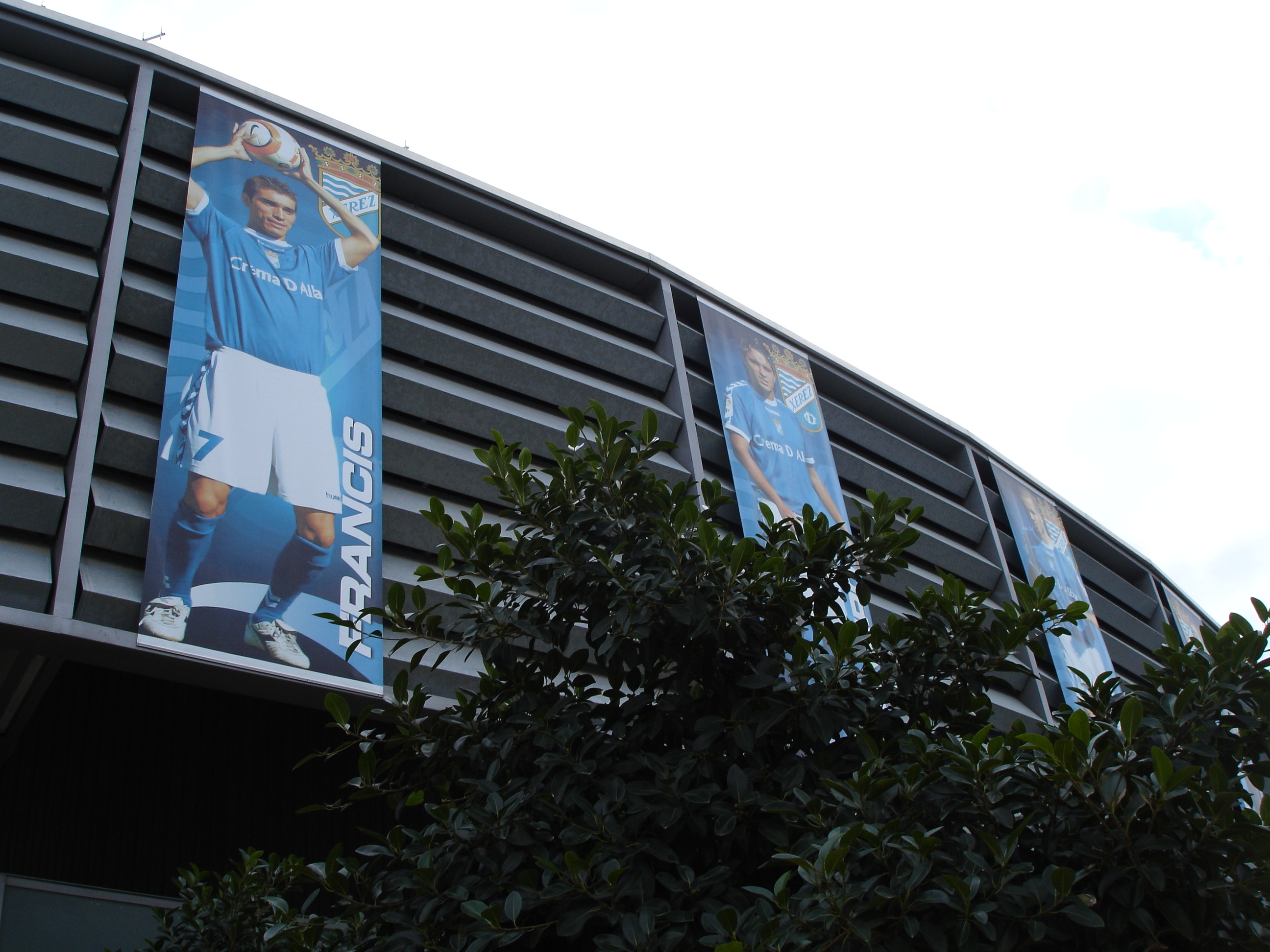 Exterior del Estadio Municipal de Chapín con publicidad de Xerez CD, Jerez (Spain)